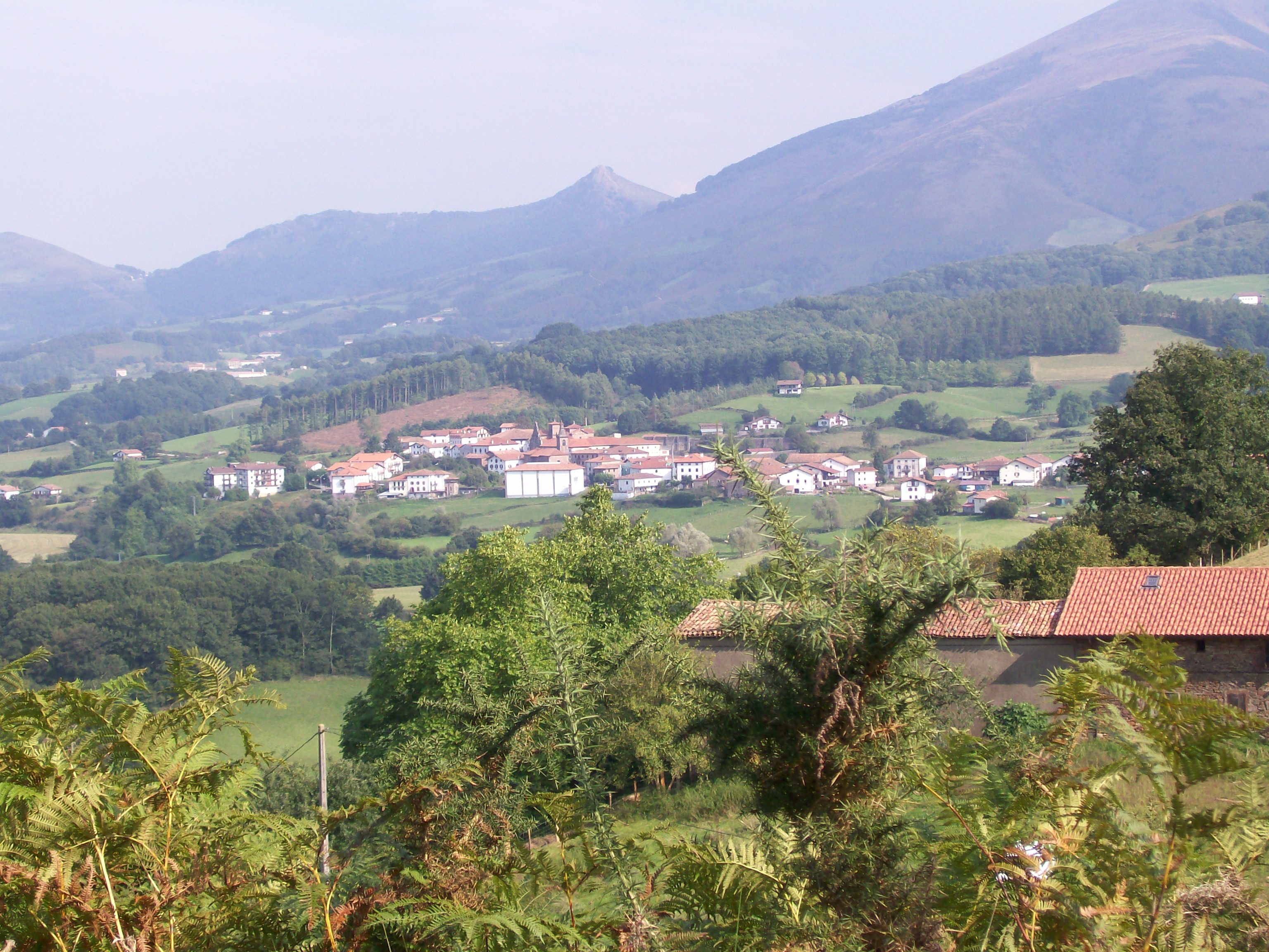 Arizkun Baztango herri nafarraren ikuspegia